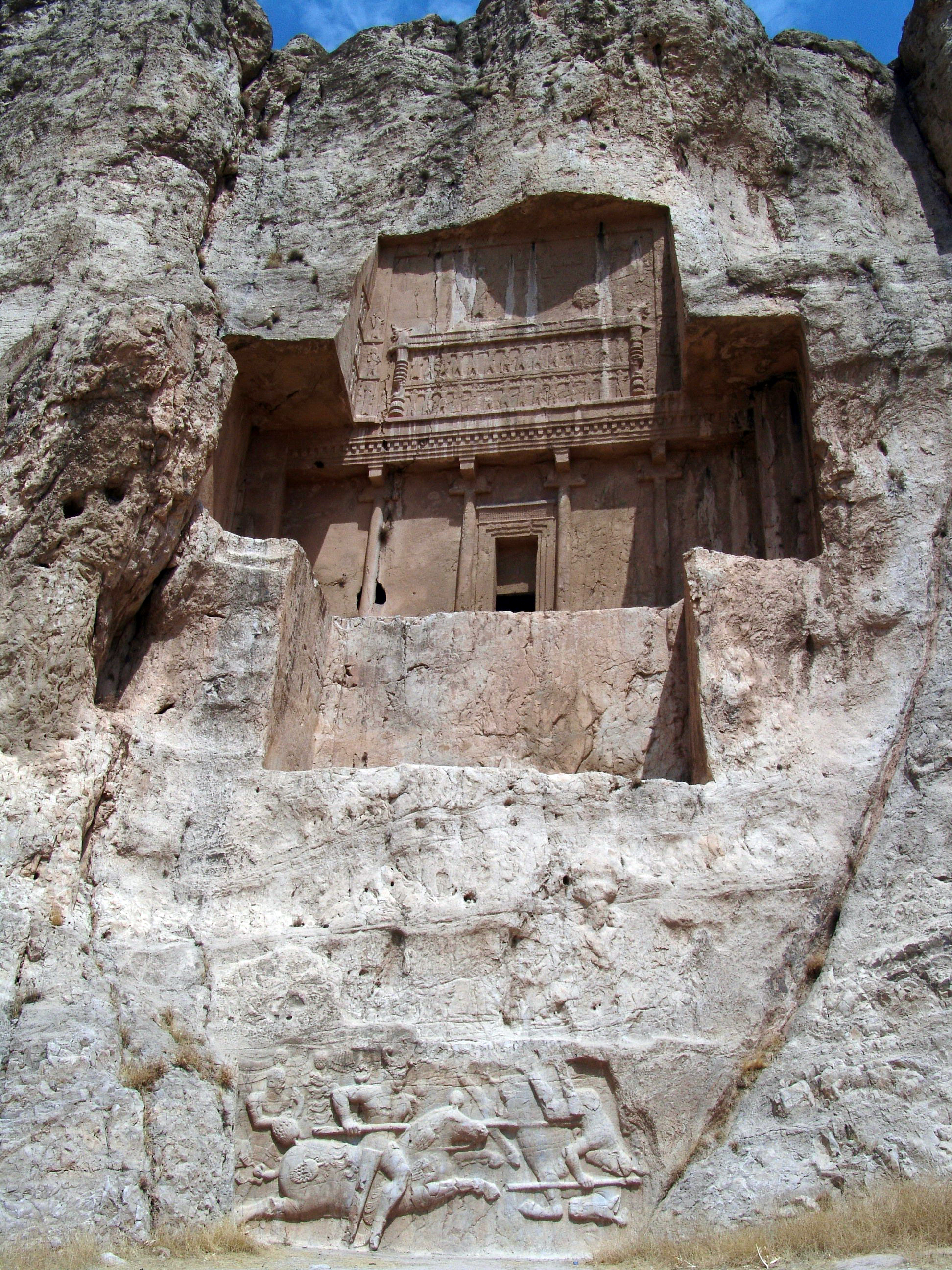 آرامگاه اردشیر یکم در نقش رستم